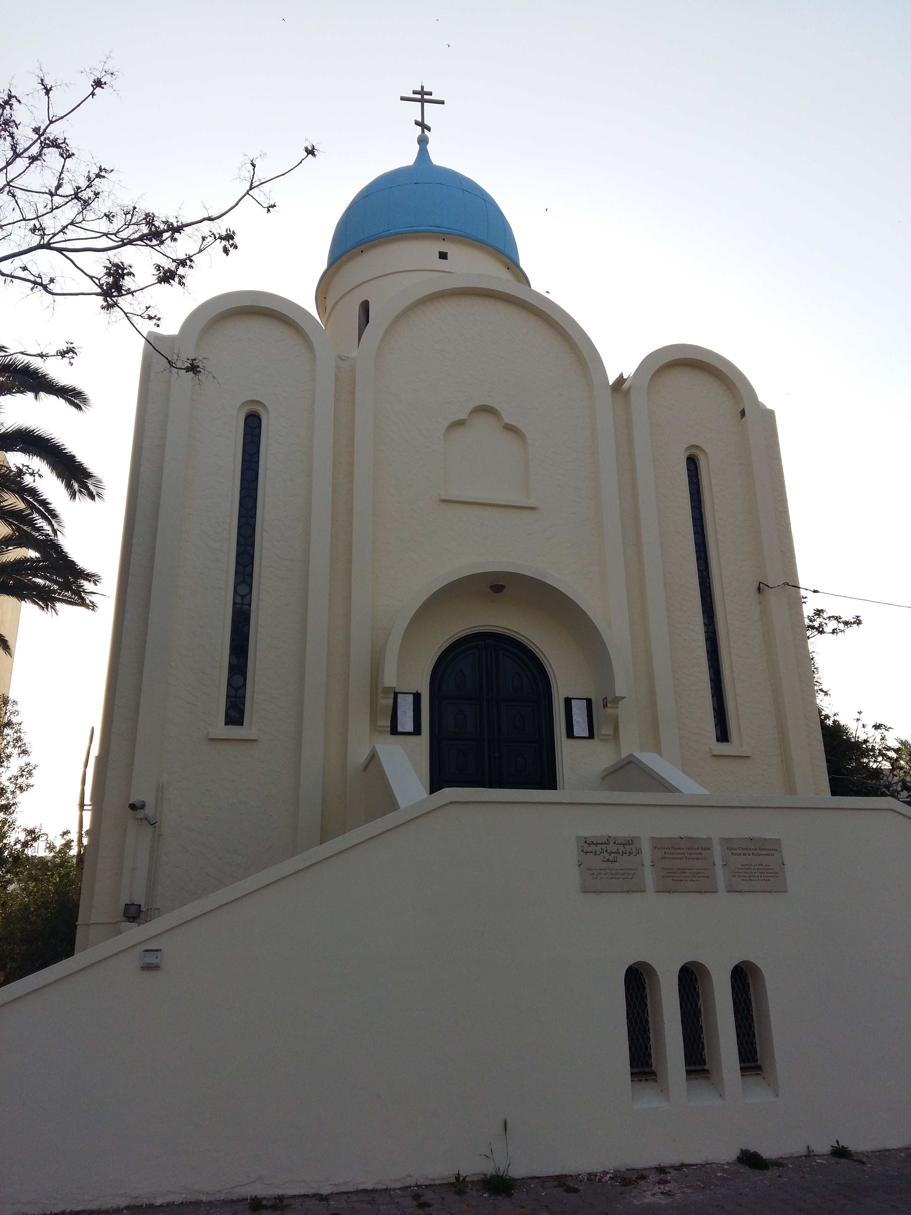 Tunis Eglise Russe